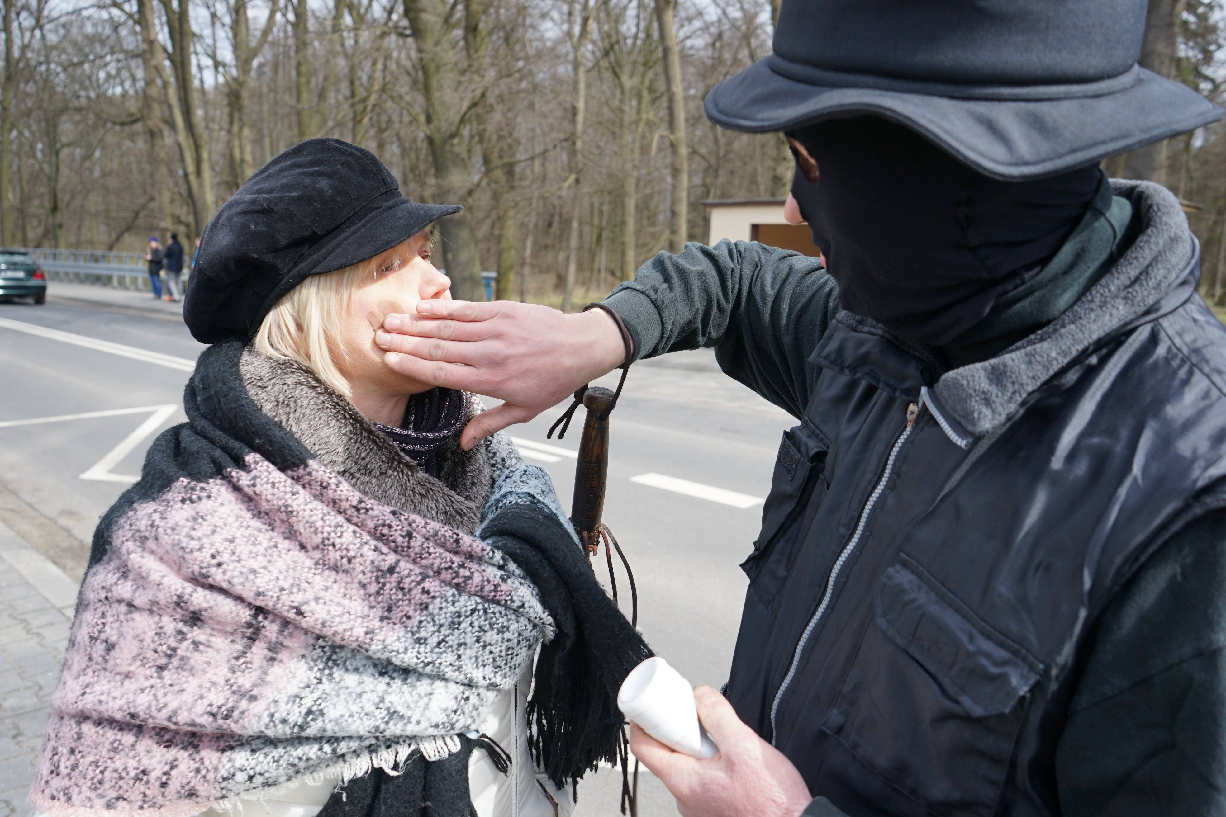 Siwki w Chobienicach odbywają się co roku w pierwszy dzień świąt Wielkanocnych. Grupy przebierańców zatrzymują samochody pobierając opłaty, grają i śpiewają na ulicach malując sadzą twarze mieszkańców, smagają rzemieniami łydki przechodniów. Zbierają dary i rozmawiają z chętnymi do udziału mieszkańcami. Pochód trwa od godzin południowych do późnego popołudnia.